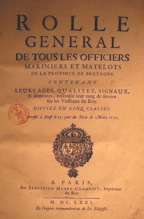 Couverture du rôle général des inscrits maritimes au moment de sa création en Bretagne par Colbert. 1671.